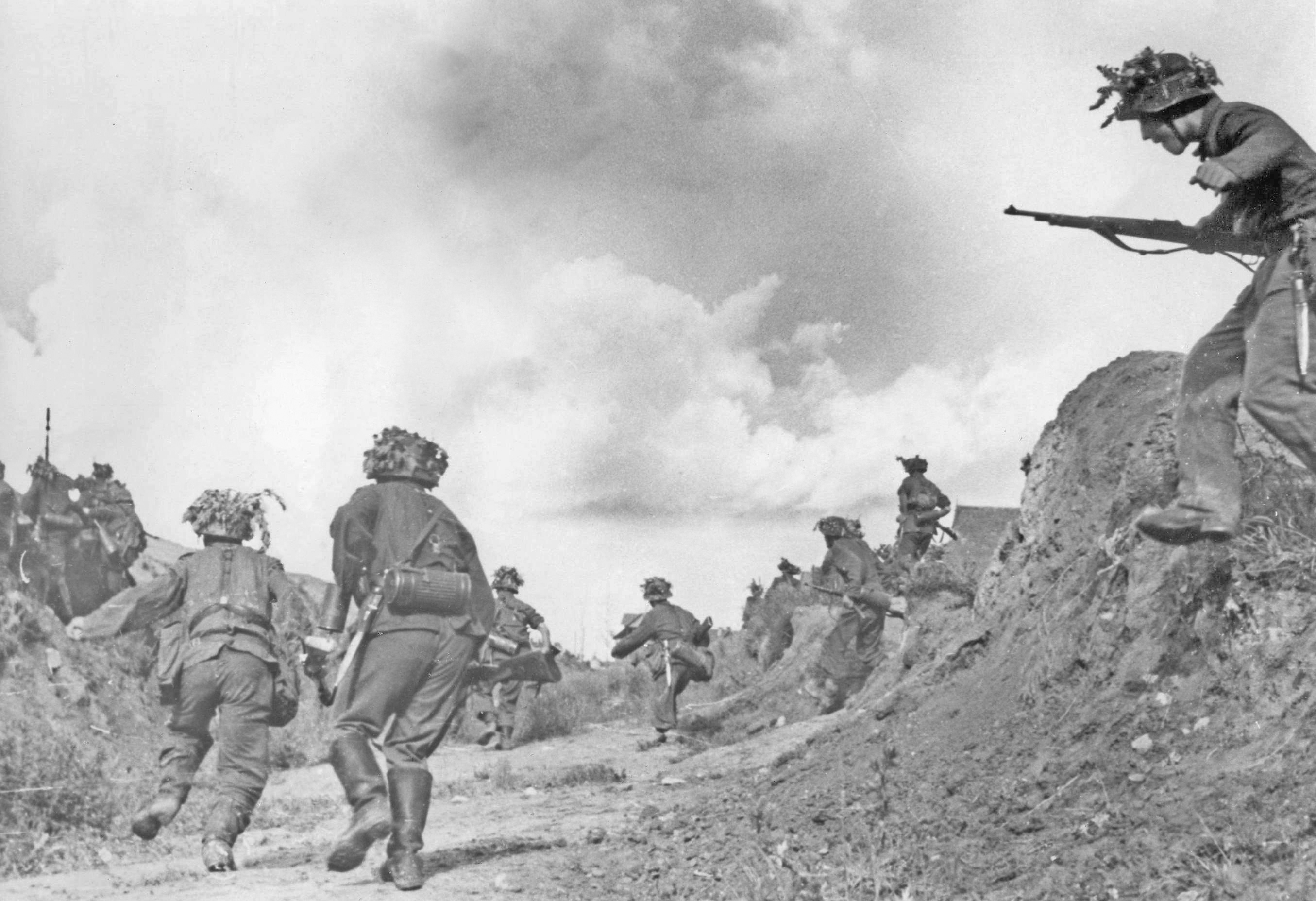 Soldados del ejército táctico de la División Azul española en Rusia